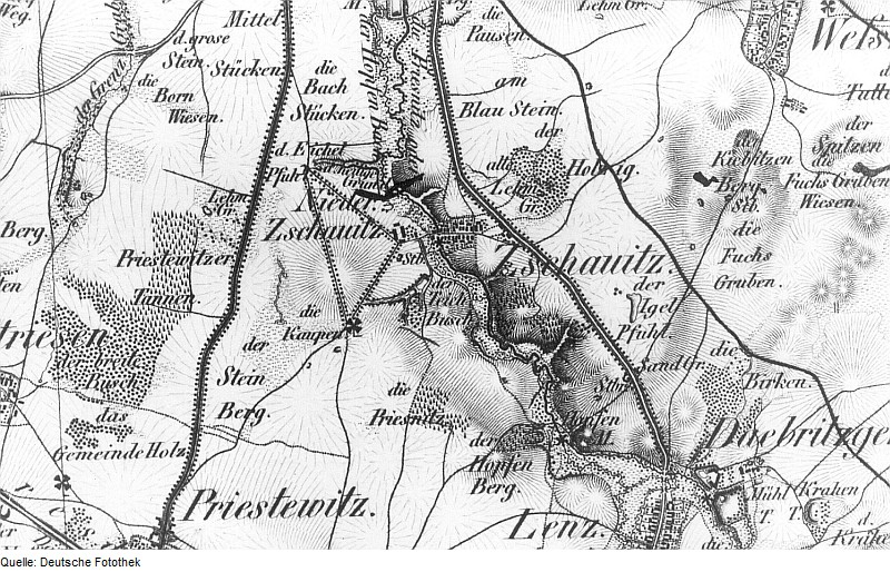 Original image description from the Deutsche Fotothek Großenhain-Zschauitz. Oberreit, Sect. Großenhain, 1841/43